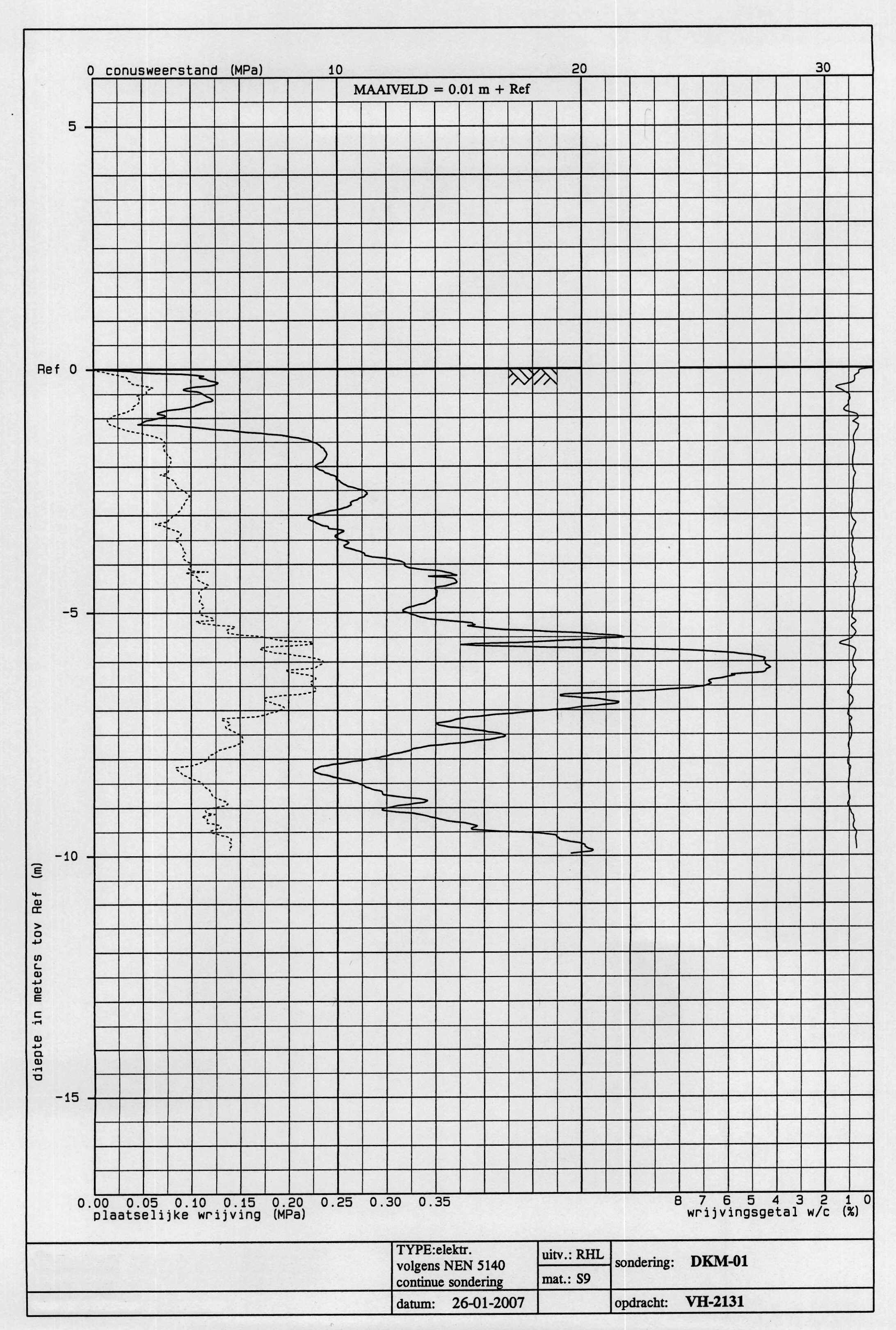 Sondeerstaat